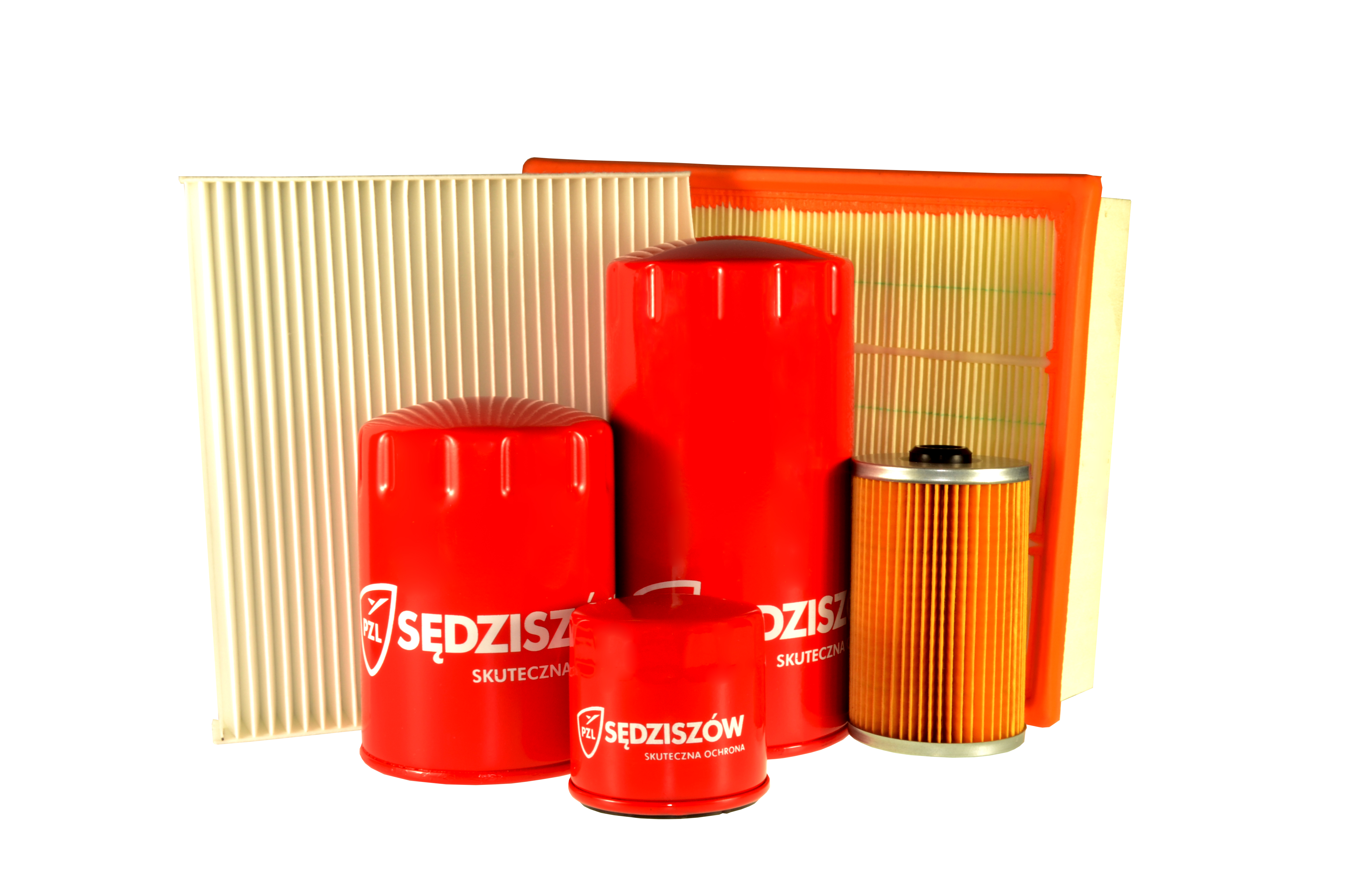 Filtry kabiny, paliwa, oleju